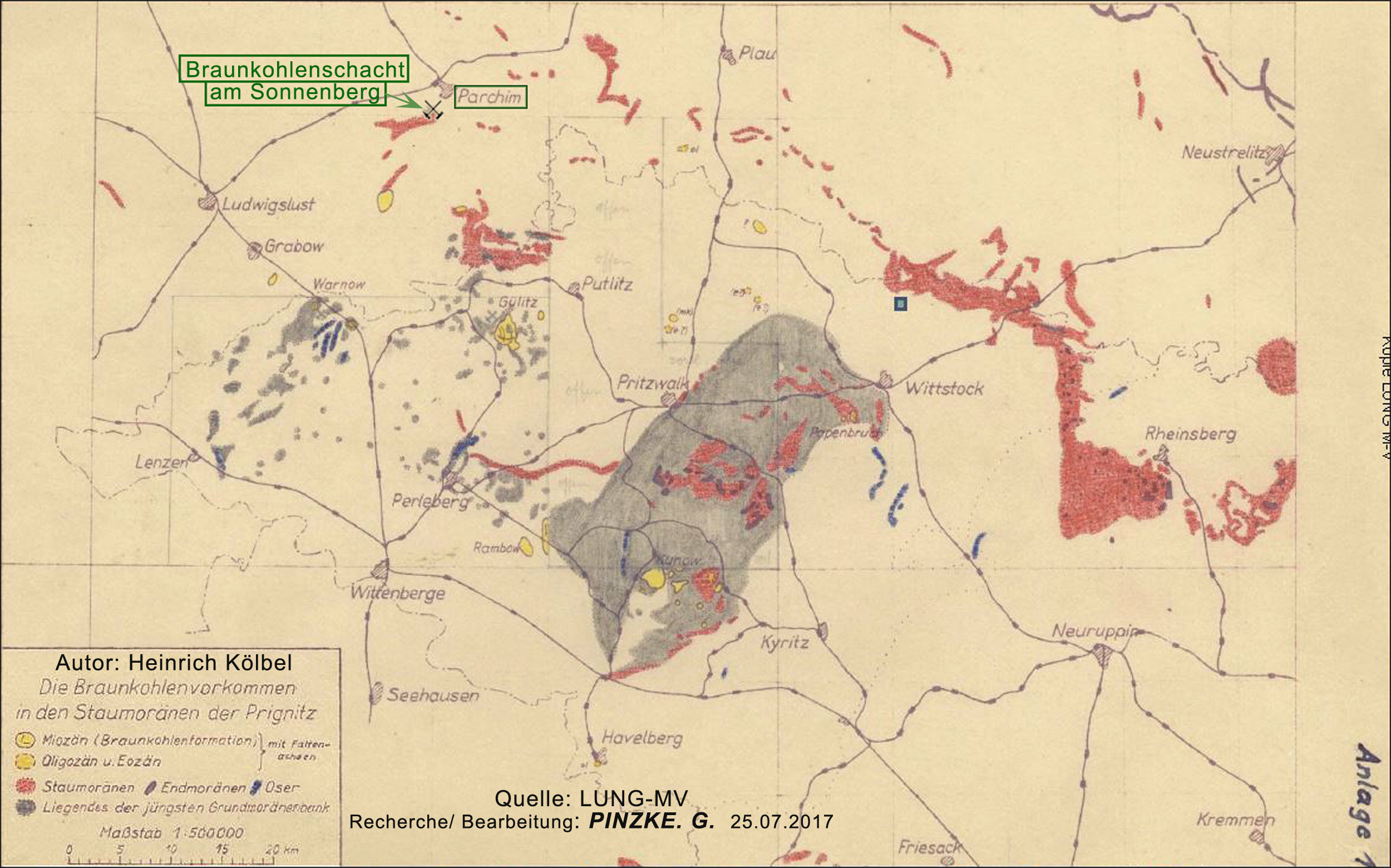 Heinrich Kölbel (1946): "Die Braunkohlenvorkommen der Prignitz". Bemerkung: Das Original der Anlage 1 ist handkoloriert.